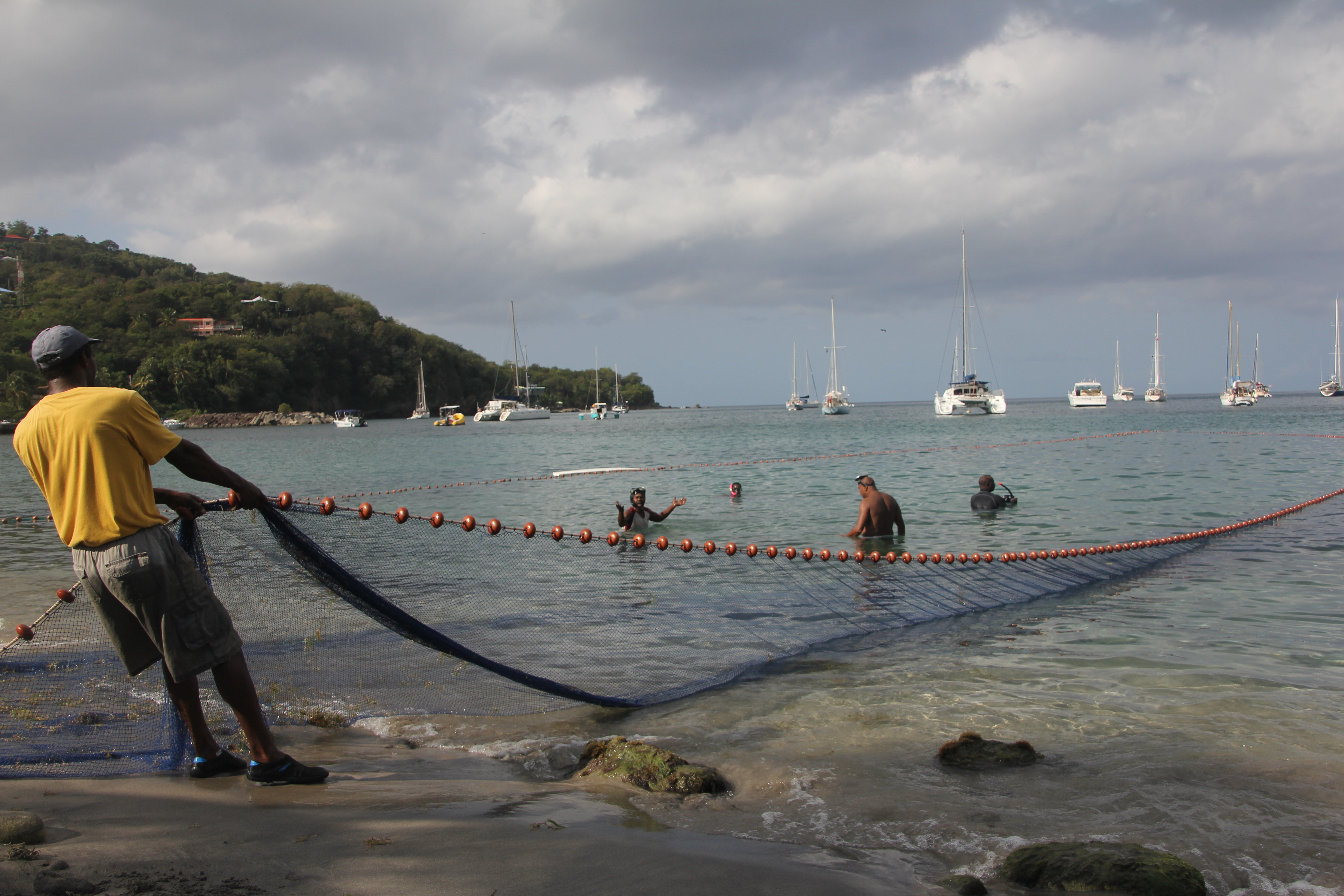 Pêche tradionnelle à Deshaies